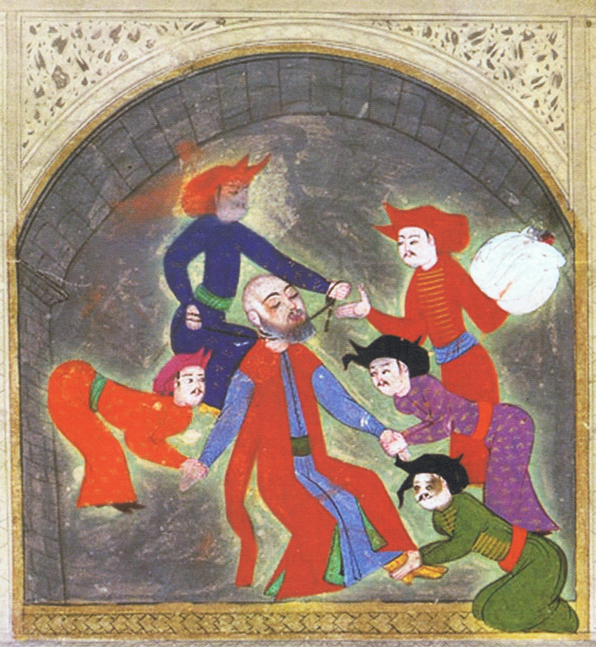 Казнь великого визиря Кара Ахмеда-паши, деталь, H.1524, f. 176b.